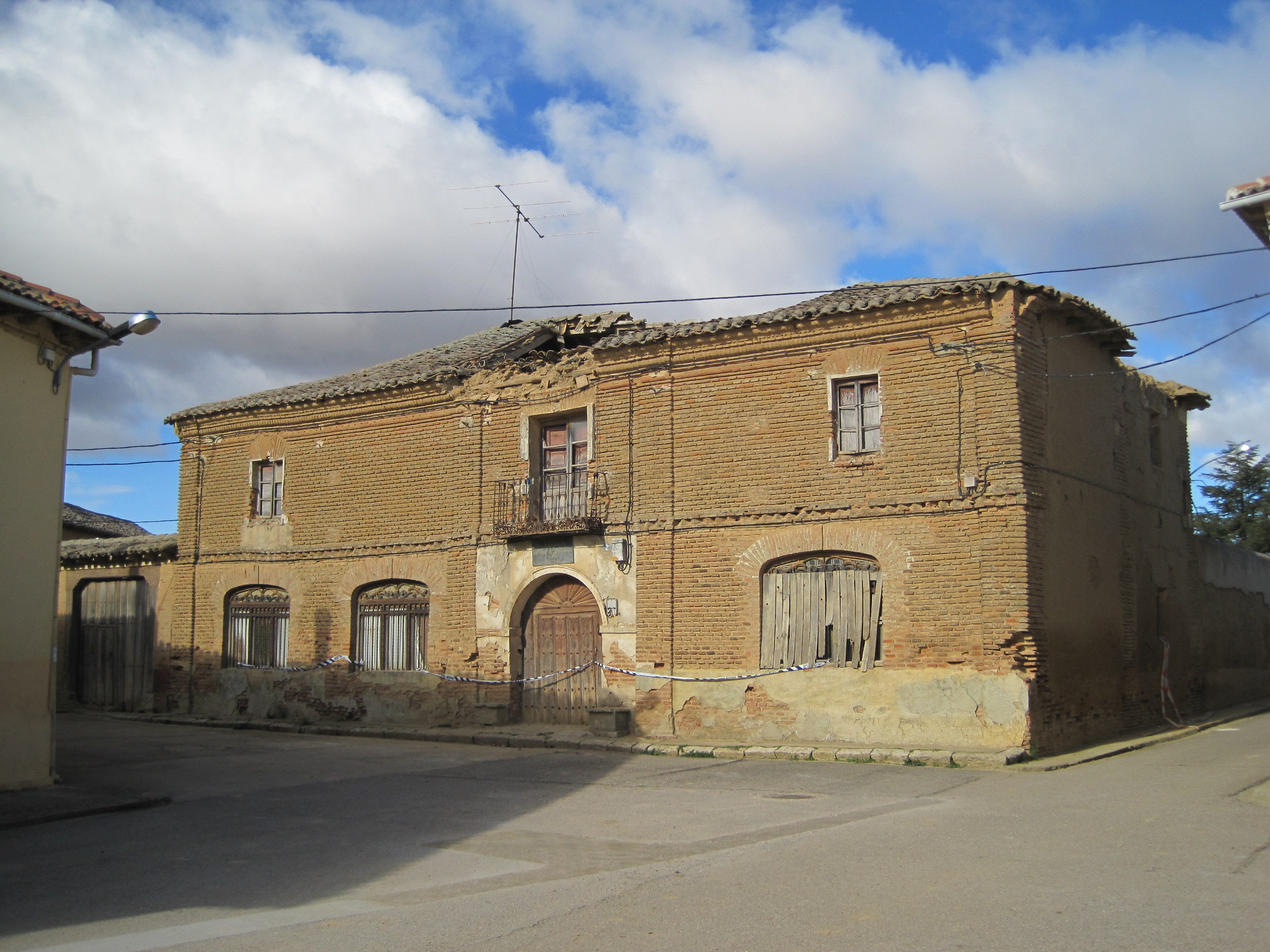 Casa familiar de Juan Manuel Díaz Caneja en Pozo de Urama (Palencia, España).